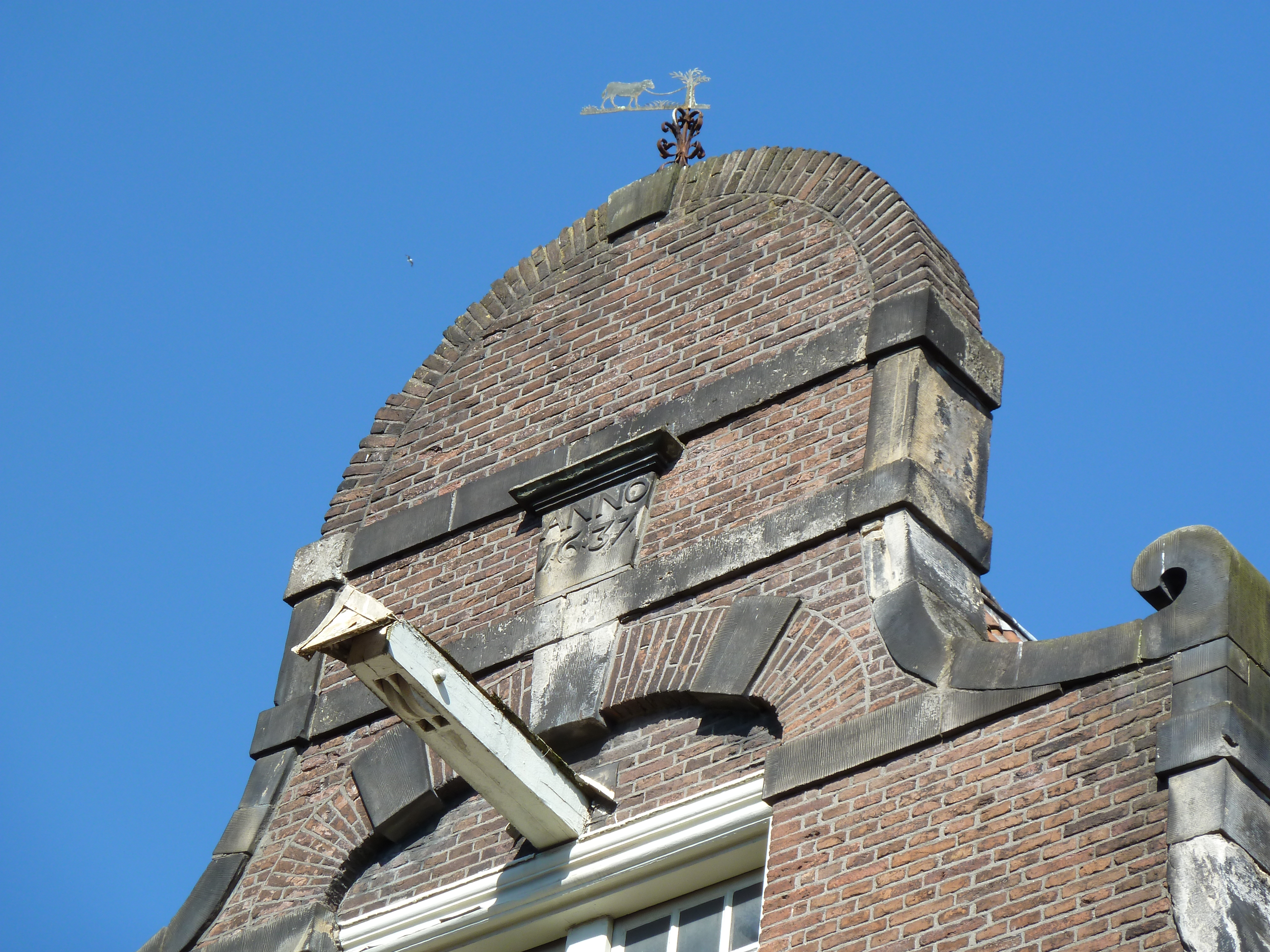 Jansveld 24A, Utrecht, NL. Achtergevel van de voormalige Grote Vleeshal, later de Jeugdbibliotheek in Voorstraat 19